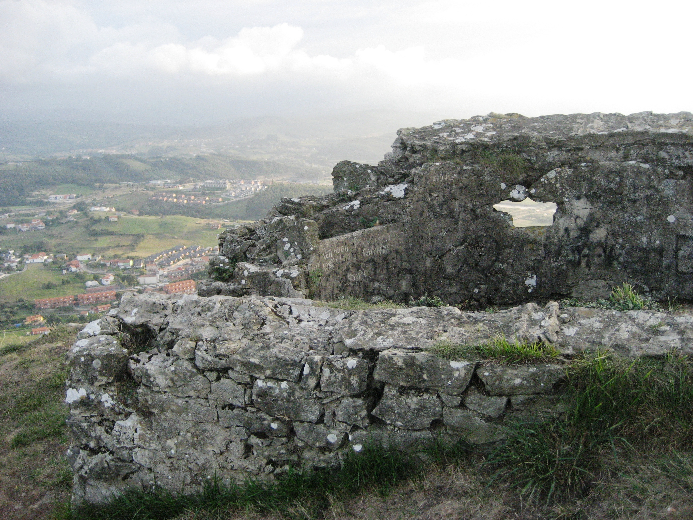 Urbanizaciones del pueblo de Liencres